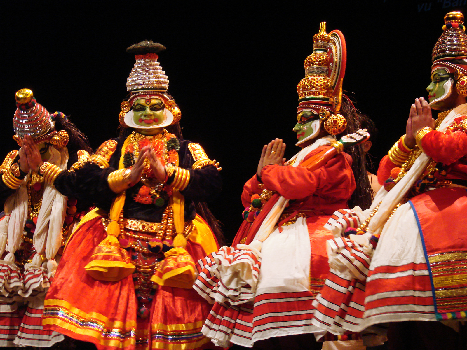 Le krishnattam ou krishnanattam – selon la transcription phonétique du sanscrit – une forme spectaculaire rituelle, gardant valeur d’offrande, dans le temple de Guruvayur, au Kerala, se traduirait par « le jeu de Krishna ». Le personnage central, Krishna, un avatar du dieu Vishnu, lui même considéré comme une divinité primordiale, s’exprime par la musique, le chant, la danse et des gestes d’une grande élégance. Krishnanattam Spectacle rituel du Kerala (Inde) par la troupe du grand temple de Guruvayur sous la direction du Maître M. Sankaranarayanan à la Maison des cultures du monde pour le 14è festival de l'imaginaire